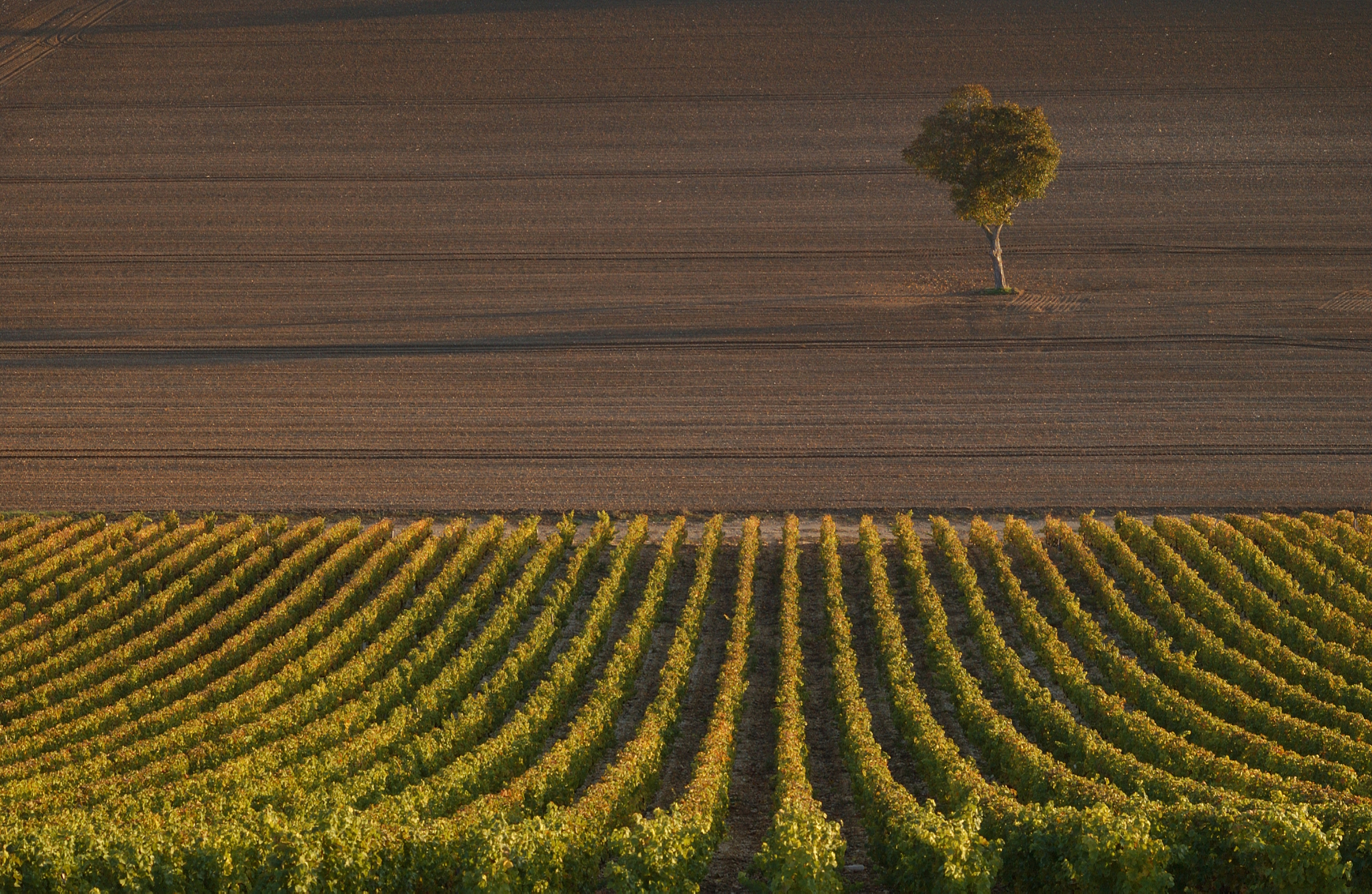 Vignes en coteau de l'AOC sancerre à l'automne